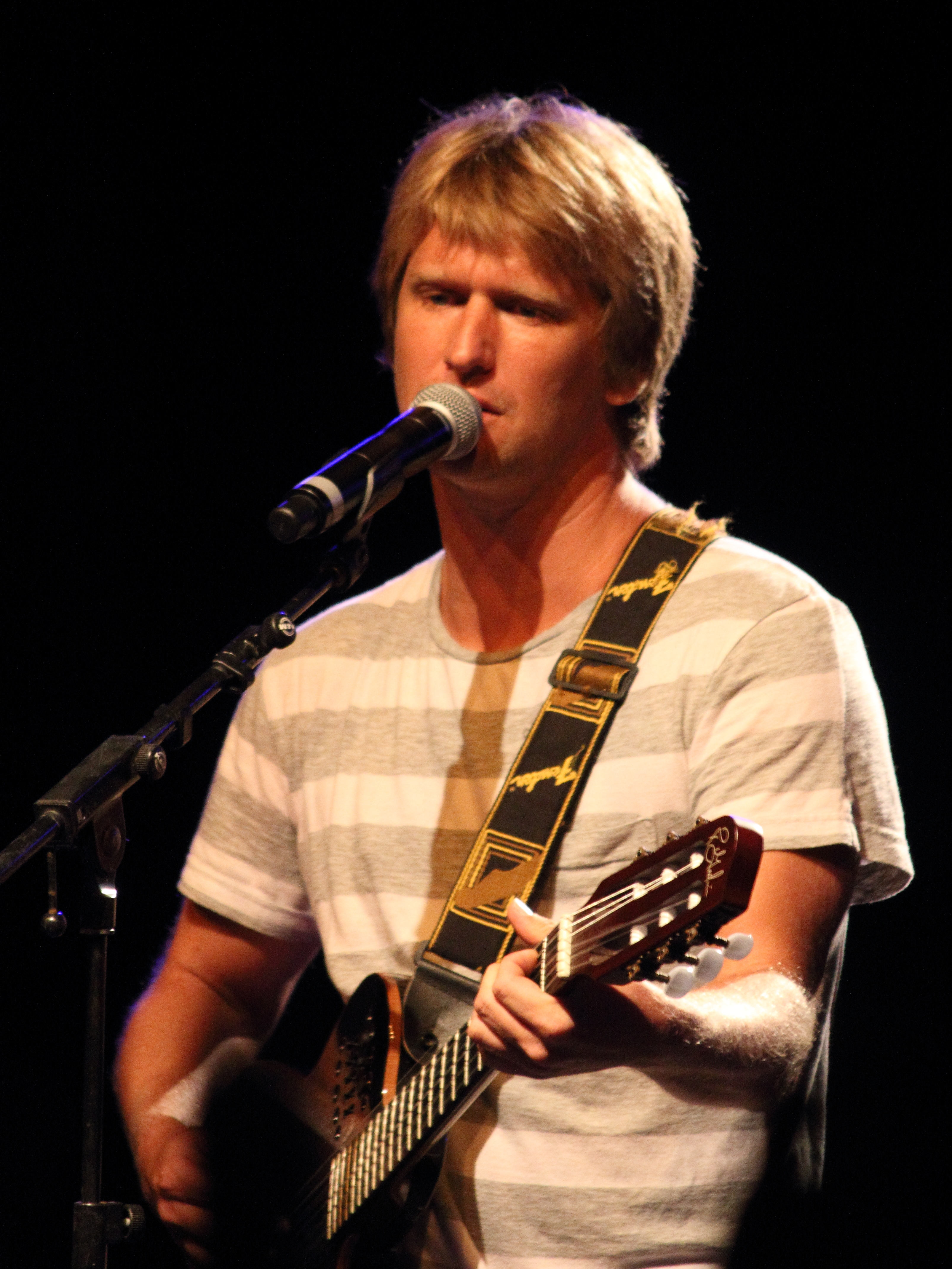 Tom Frager à Festivaux 2012